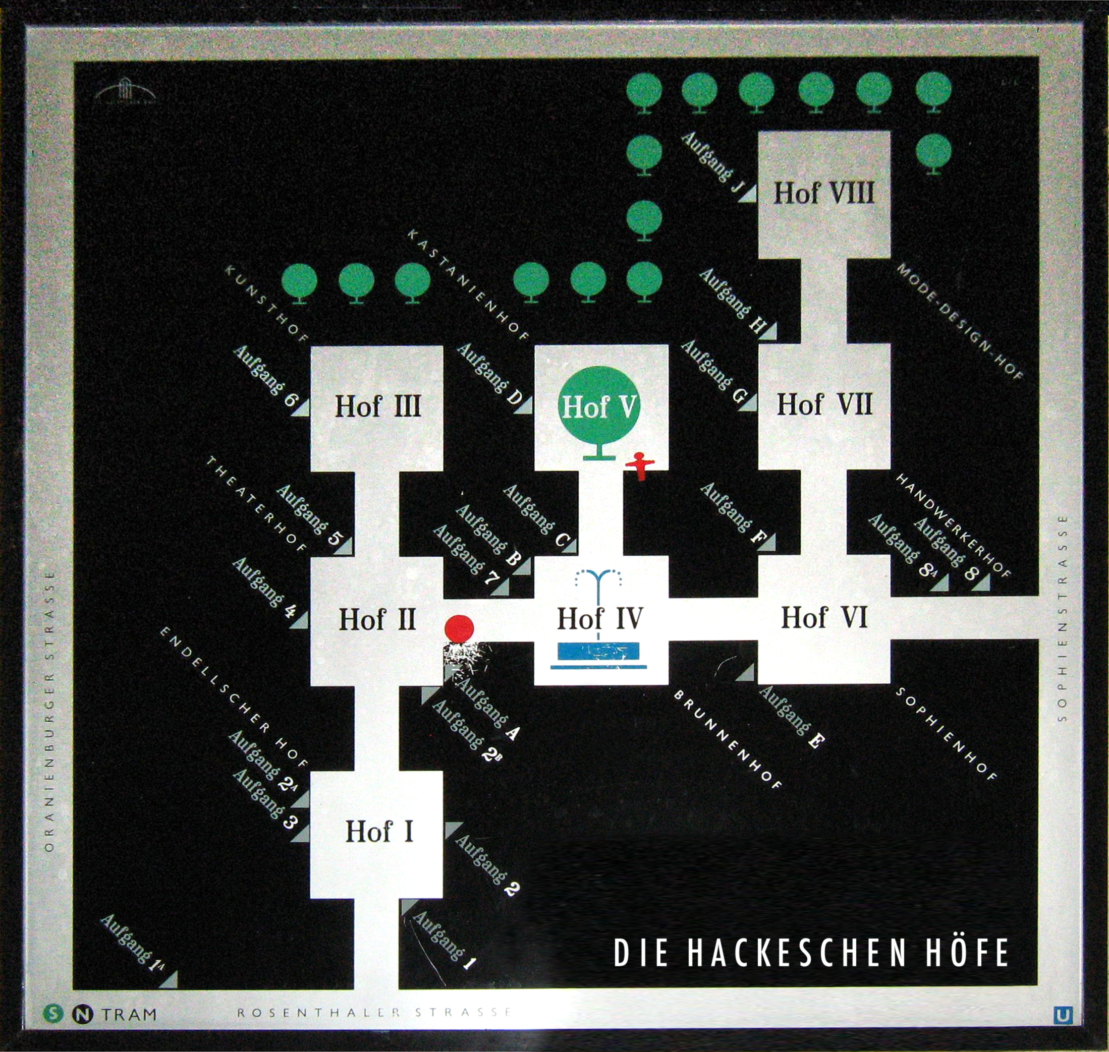 Hinweisschild: Die Hackeschen Höfe 2009 in Berlin